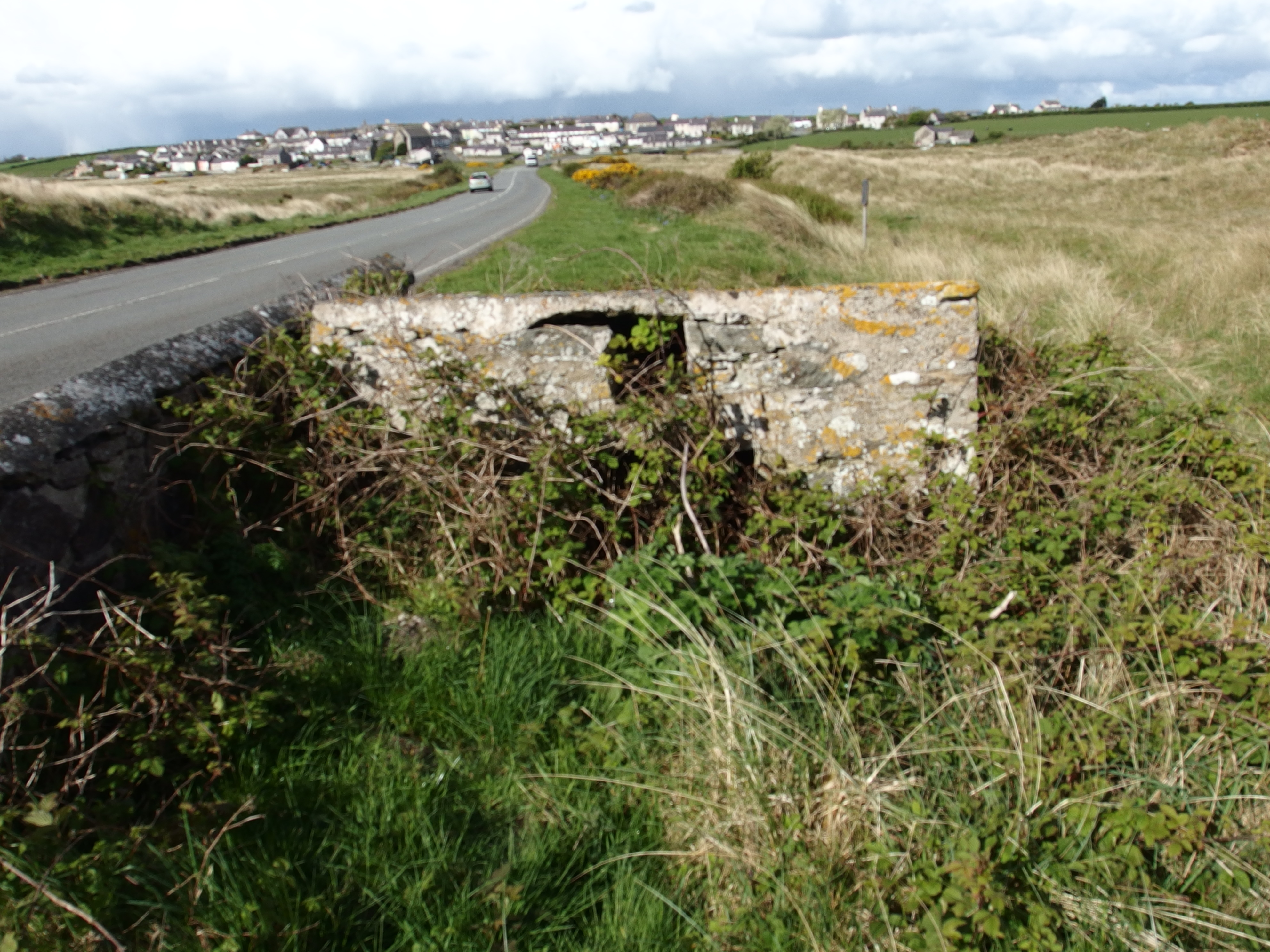 Ffynnon Bryn Bendigaid